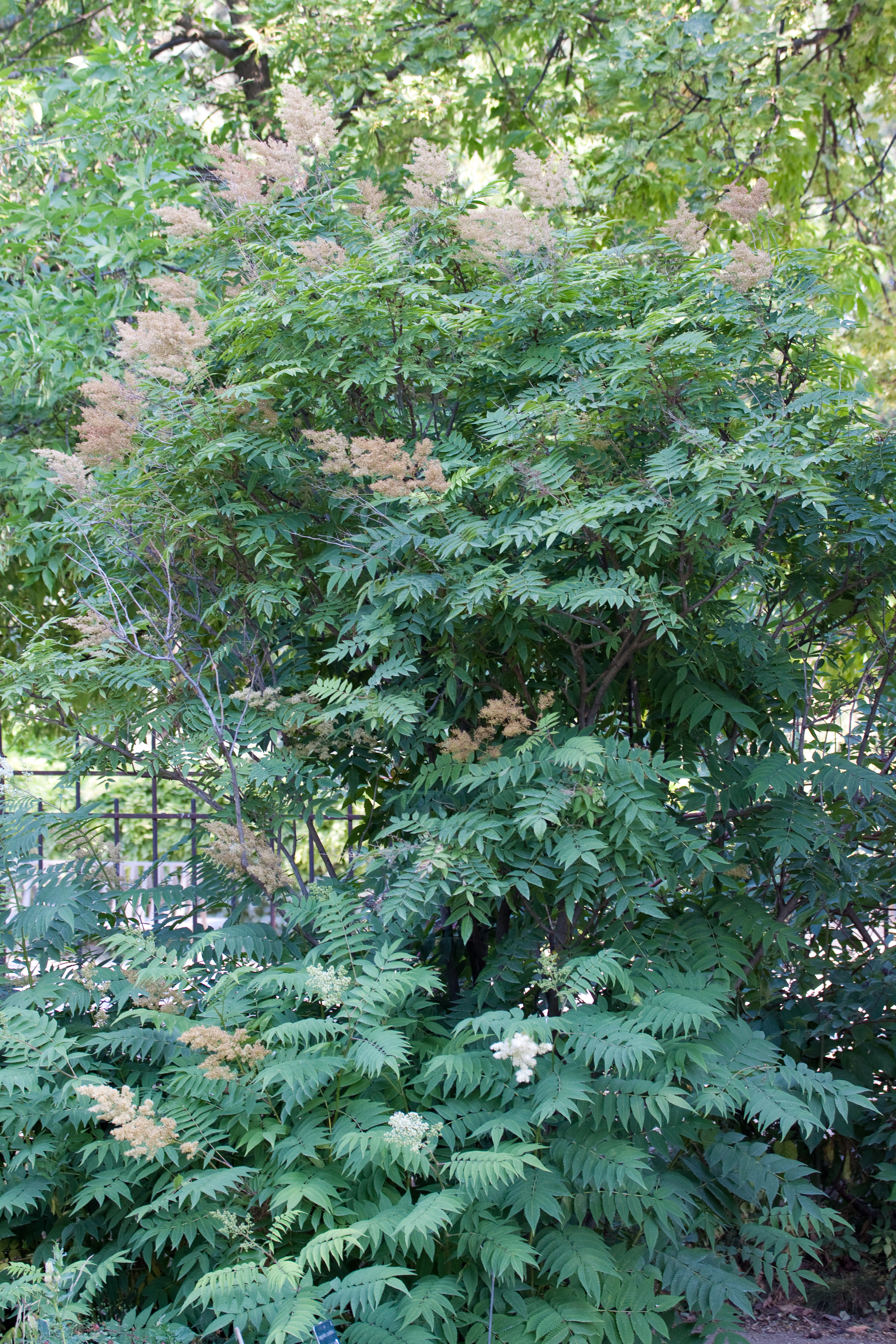 Vue générale de Sorbaria sobifolia - Jardin des Plantes - Paris